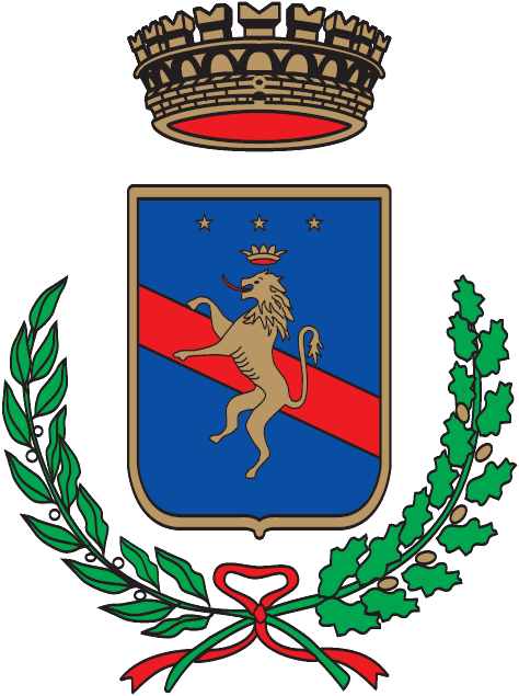 stemma di Potenza